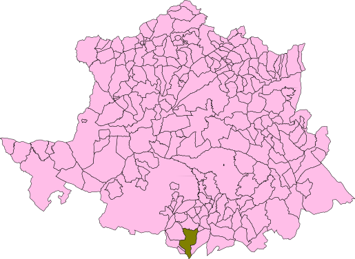 Arroyomolinos